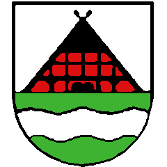 blazono de la komunumo Tespe, mem malprofesie farita laŭ bildaj informoj de la grafike malpli preciza dosiero file:Wappen Tespe.gif